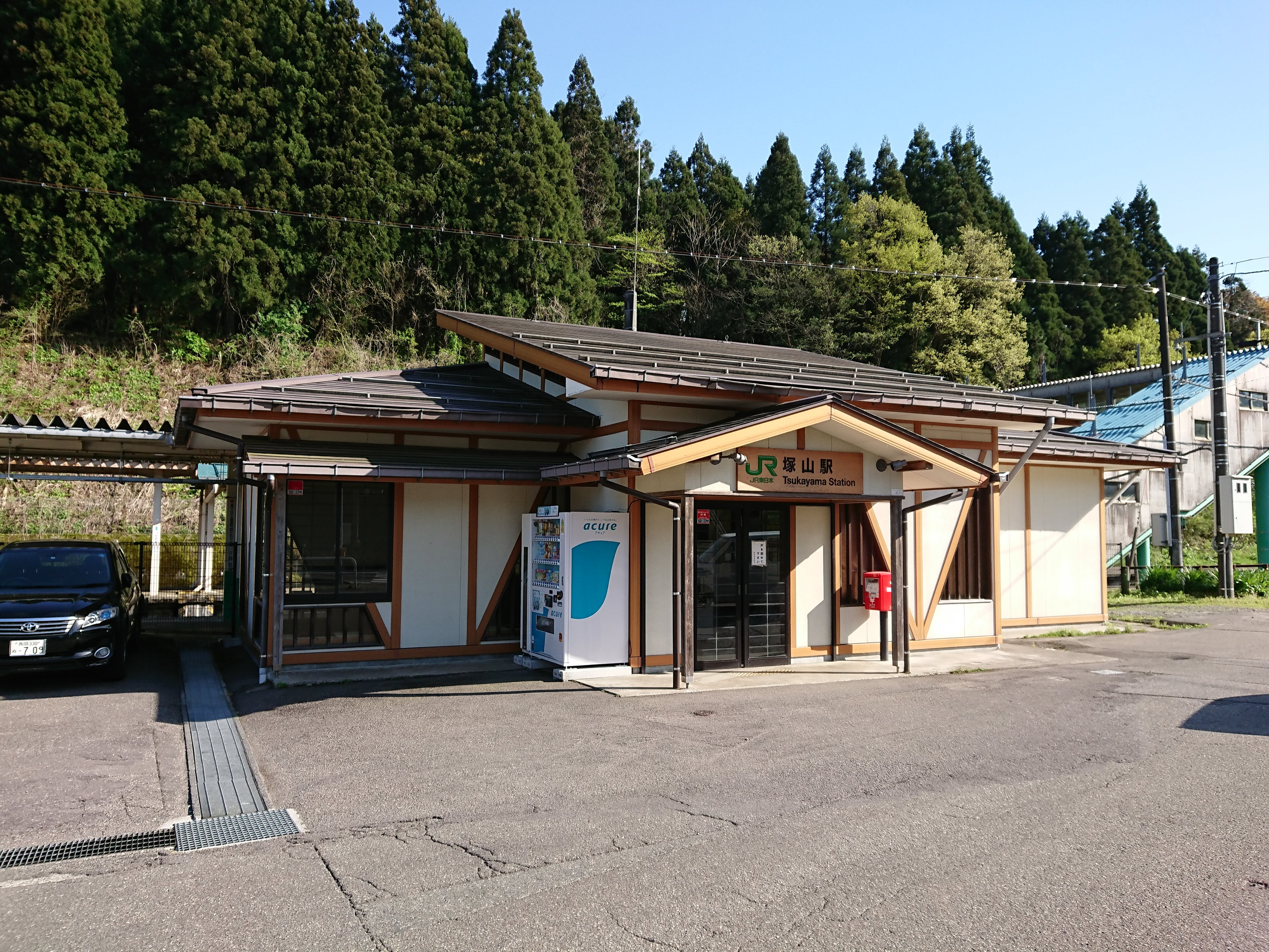 塚山駅の駅舎外観